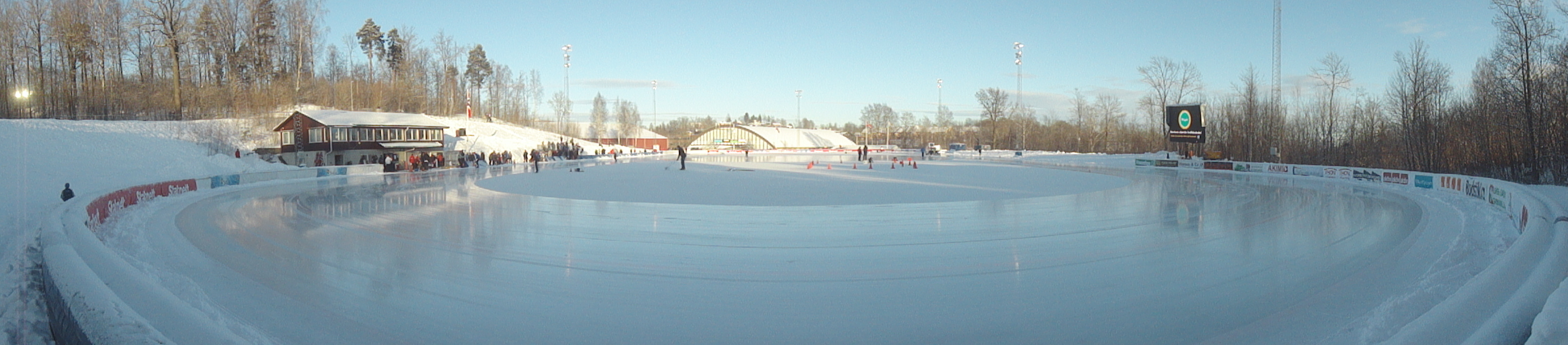 Kunstisbane i Asker, Norge